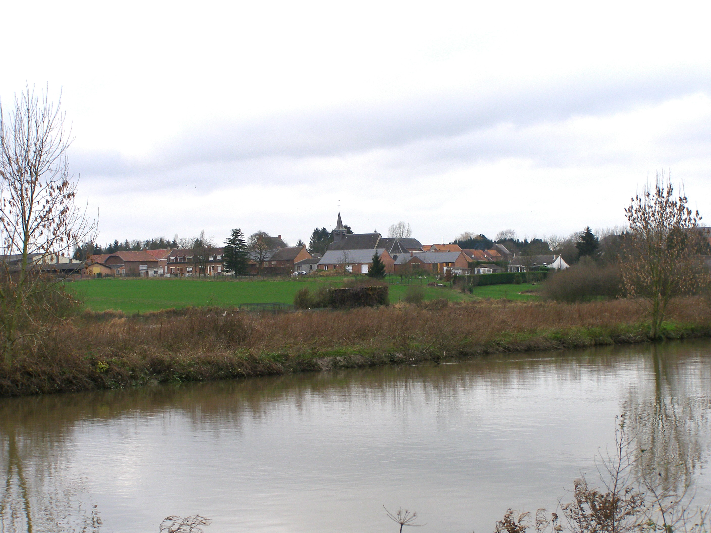 Vue d'ensemble.